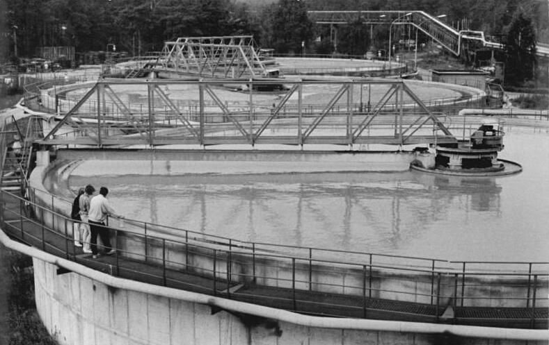 Schwedt, Papierwerk, Kläranlage ADN-ZB Müller-1.12.87 Bez. Frankfurt-Oder: Feinste Faserwertstoffe, die bei der Papierherstellung "durchs Sieb rutschen" und somit verloren gingen, werden jetzt im VEB Papier- und Kartonwerke Schwedt zurückgewonnen und weiterverwendet. Mit der Inbetriebnahme dieser neun Restwasserkläranlage konnte eine weitere Abproduktarme und wassersparende Technologie entwickelt werden. Das von einem Jugendforscherkollektiv entwickelte Verfahren bedeutet gleichermaßen ökonomischen Umfang mit Wasser und Rohstoffen wie auch praktischen Umweltschutz. - siehe auch 1987-1201-12N